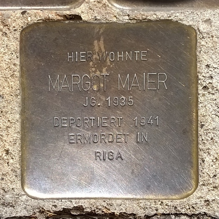 Stolperstein für Margot Maier in D-74081 Heilbronn(-Horkheim), Hohenloher Straße 15